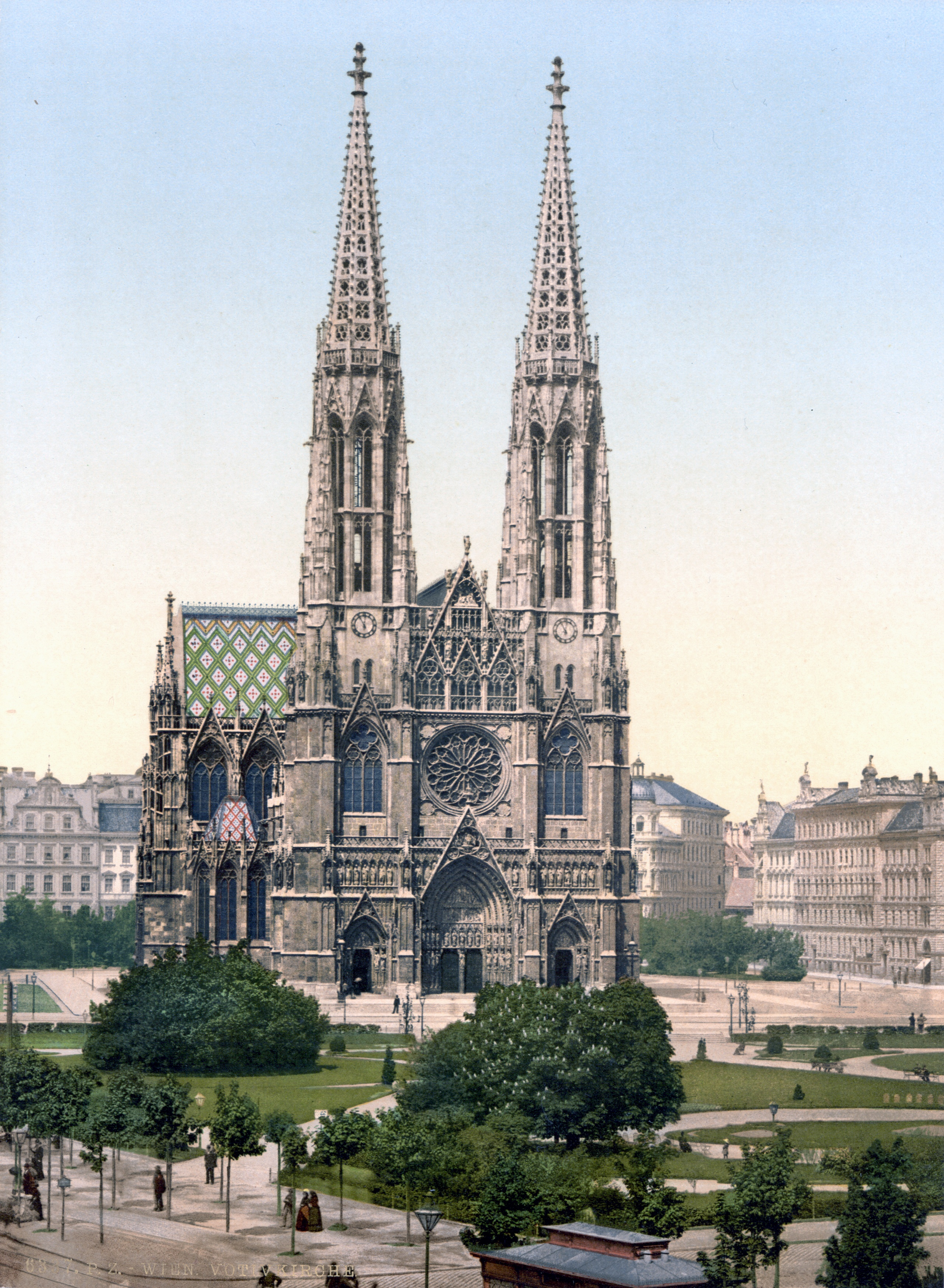 Wien Votivkirche zwischen 1890 und 1900